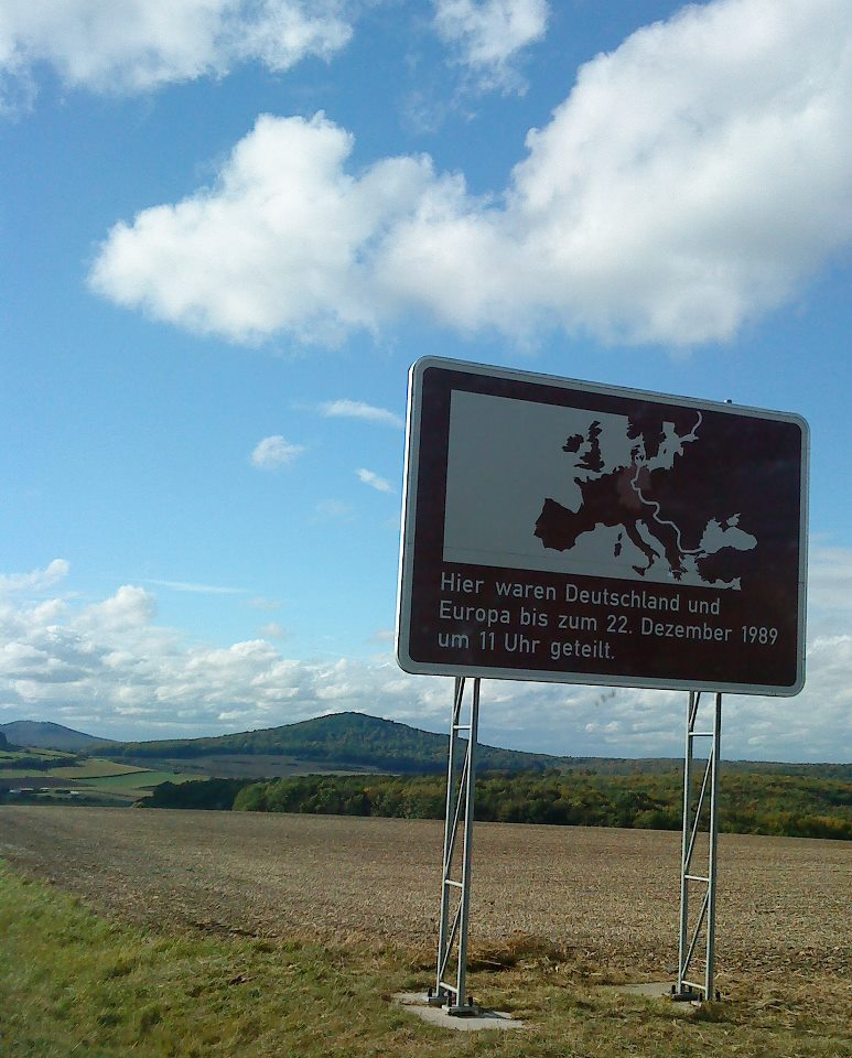 Hier waren Deutschland und Europa bis zum 22. Dezember 1989 um 11 Uhr geteilt.